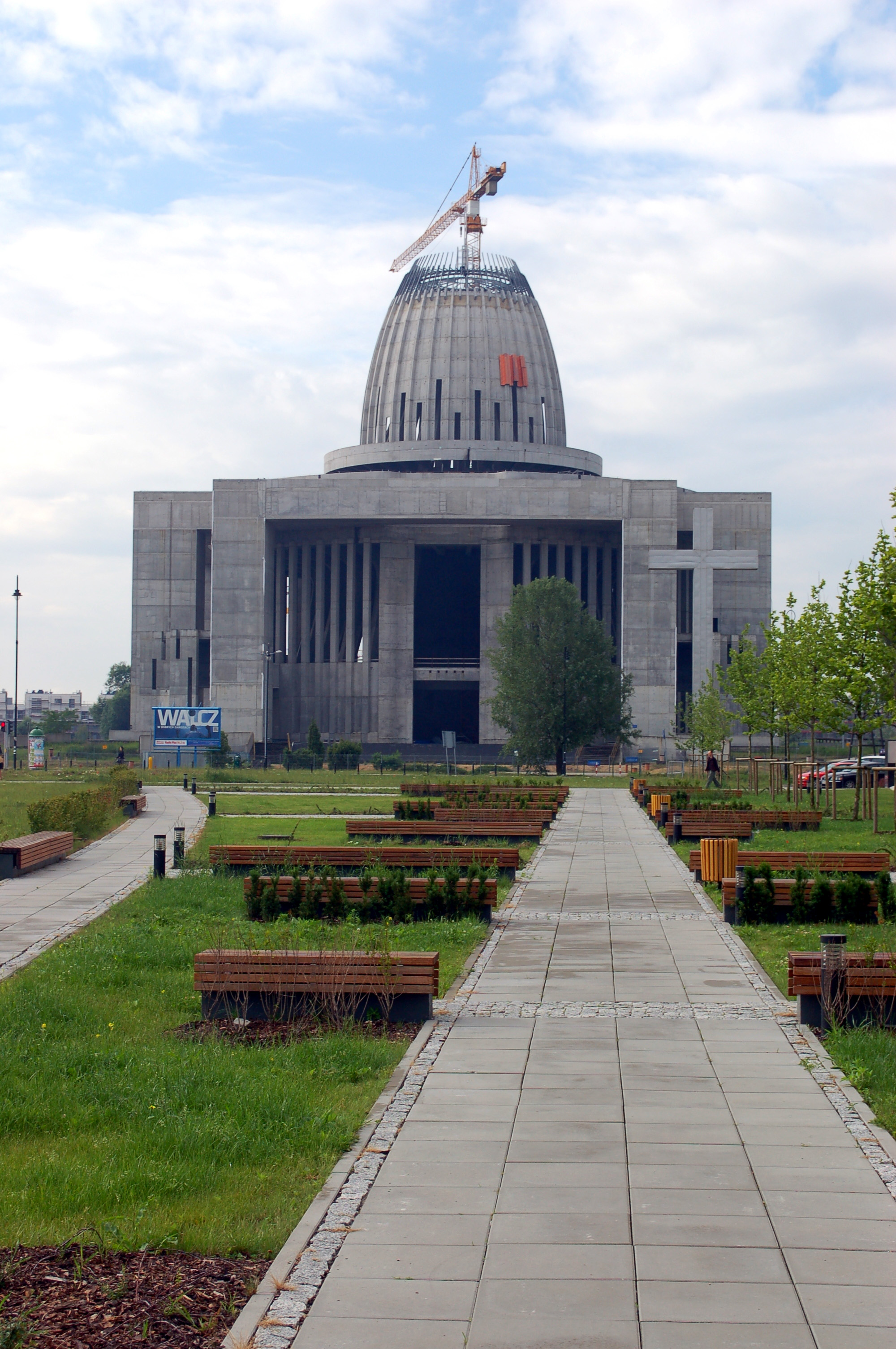 Tempel in Miasteczko Wilanow